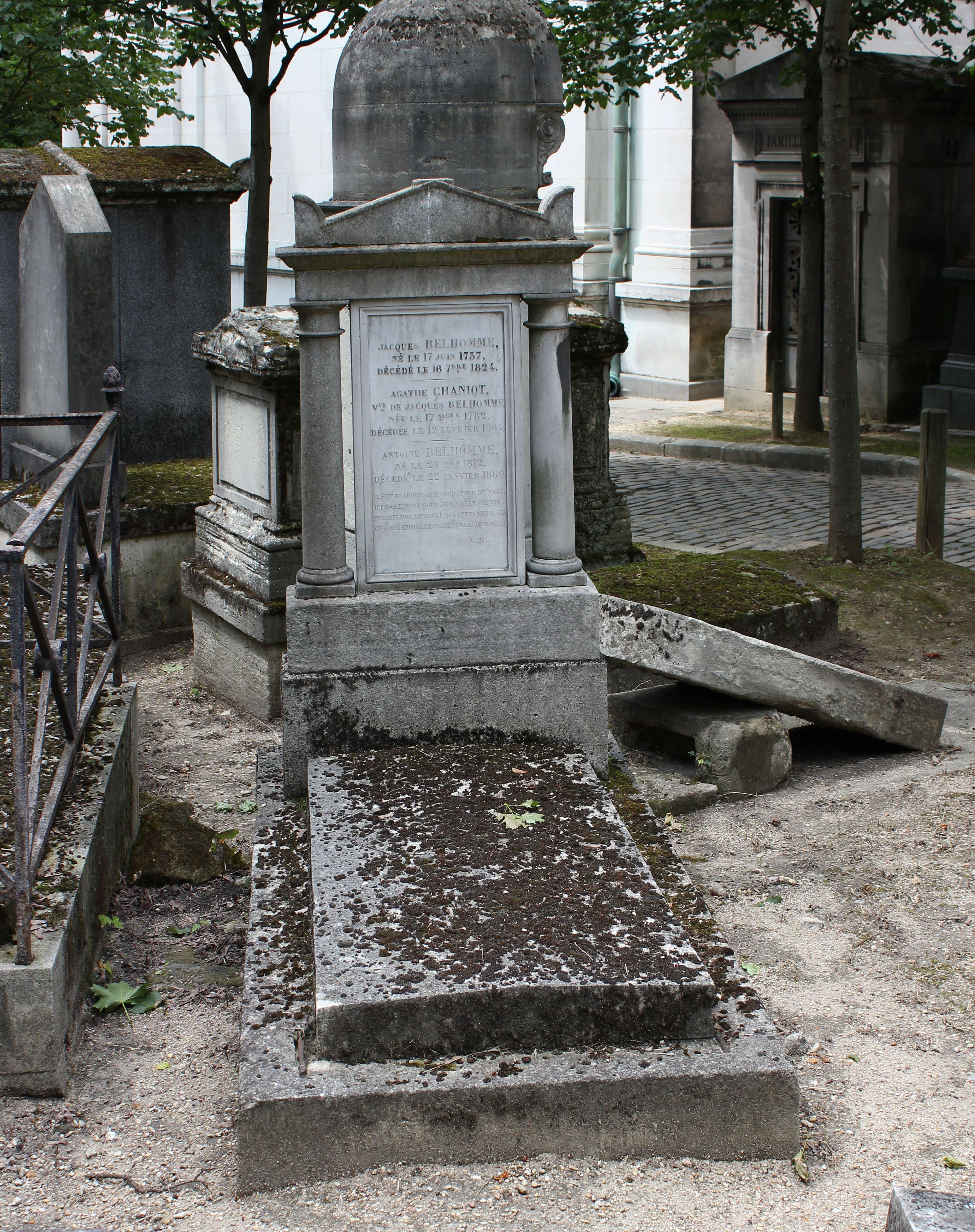 vue d'ensemble